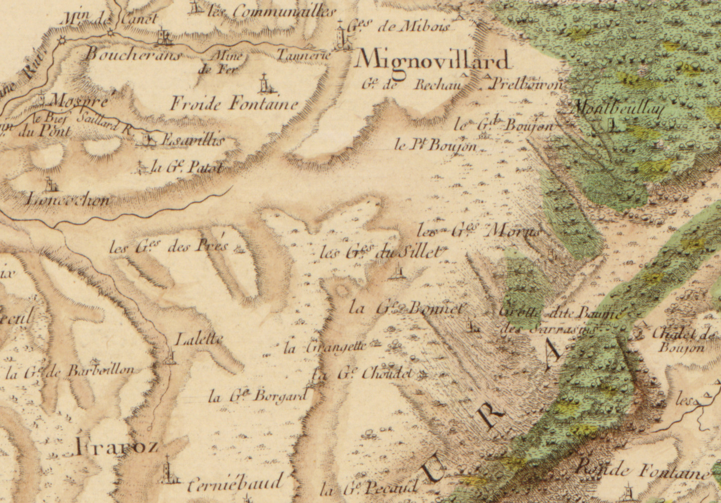 Carte de Cassini n°147 (Nozeroy, zoom sur Mignovillard), 1759.